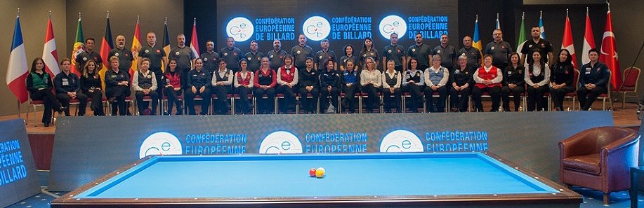 Teilnehmerinnen und Schiedsrichter der Dreiband-EM 2020 in Antalya